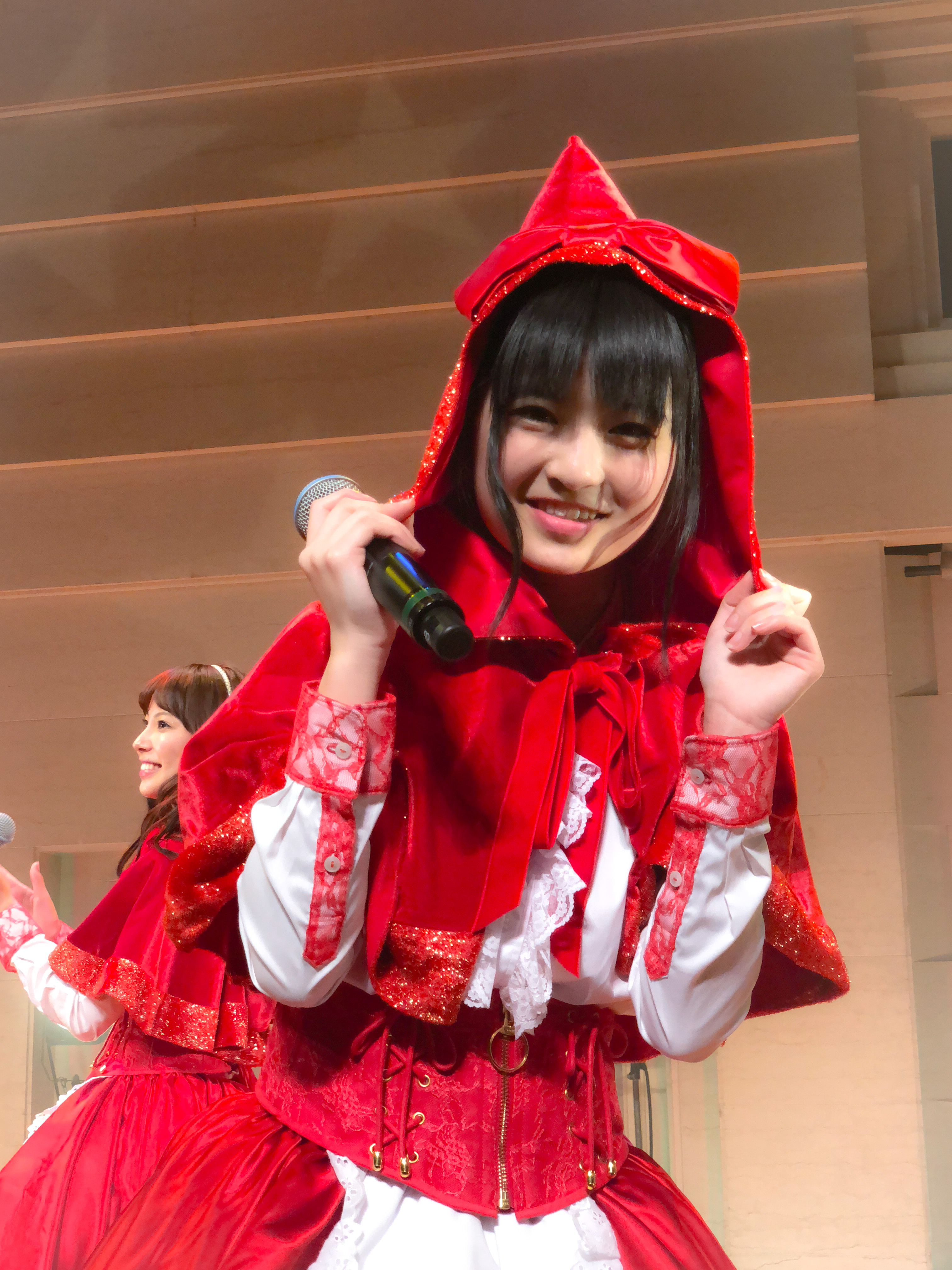 石橋蛍近影